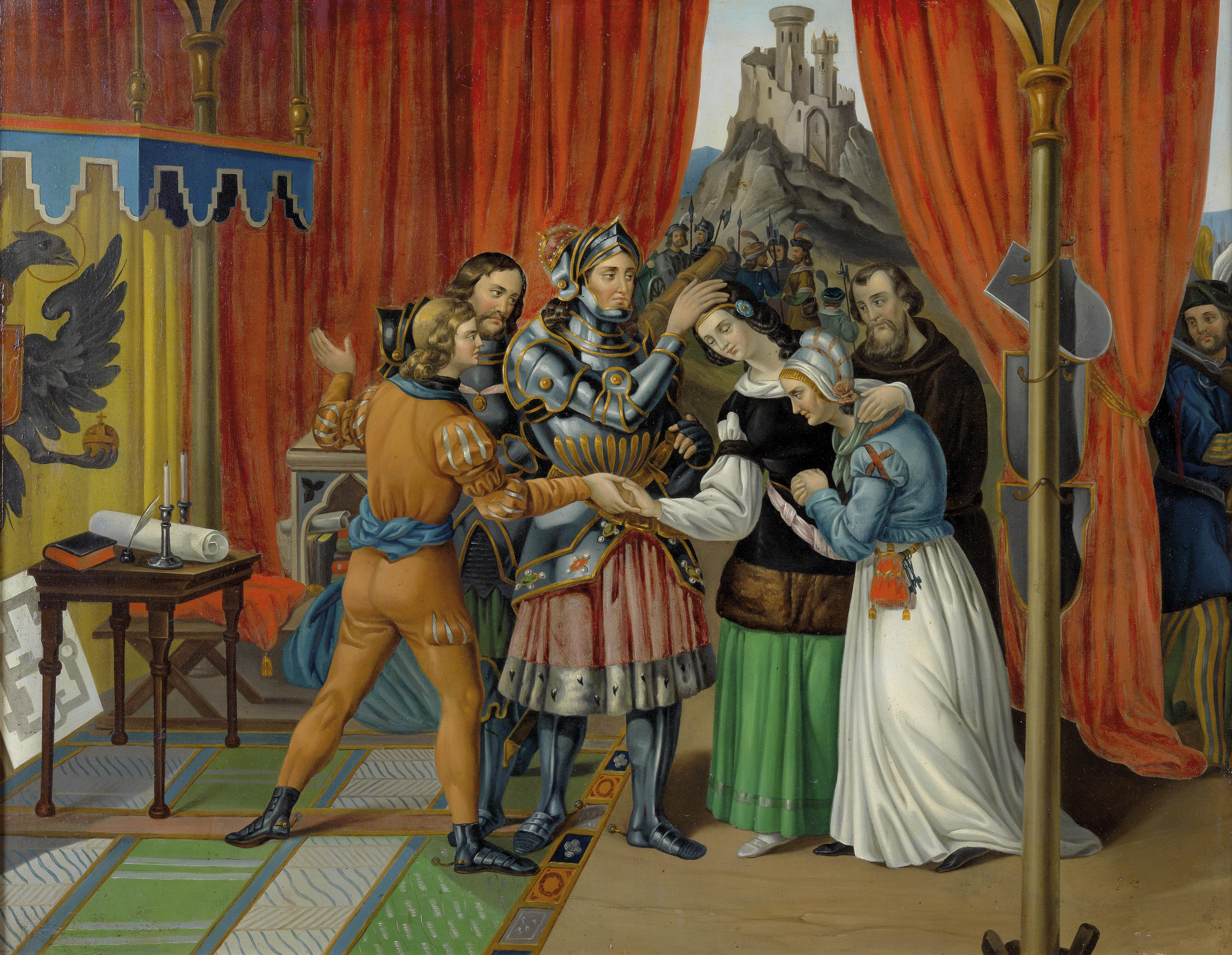 König Rudolf I. vermählt den Sohn Rudolf II. mit Agnes von Böhmen, der Tochter des Ottokar II. Premysl, Öl auf Metall, 56 x 72 cm, gerahmt, Mitte 19. Jh.